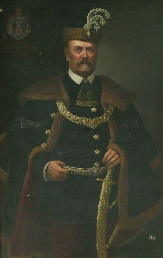 Odescalchi Gyula magyar herceg, katona, politikus